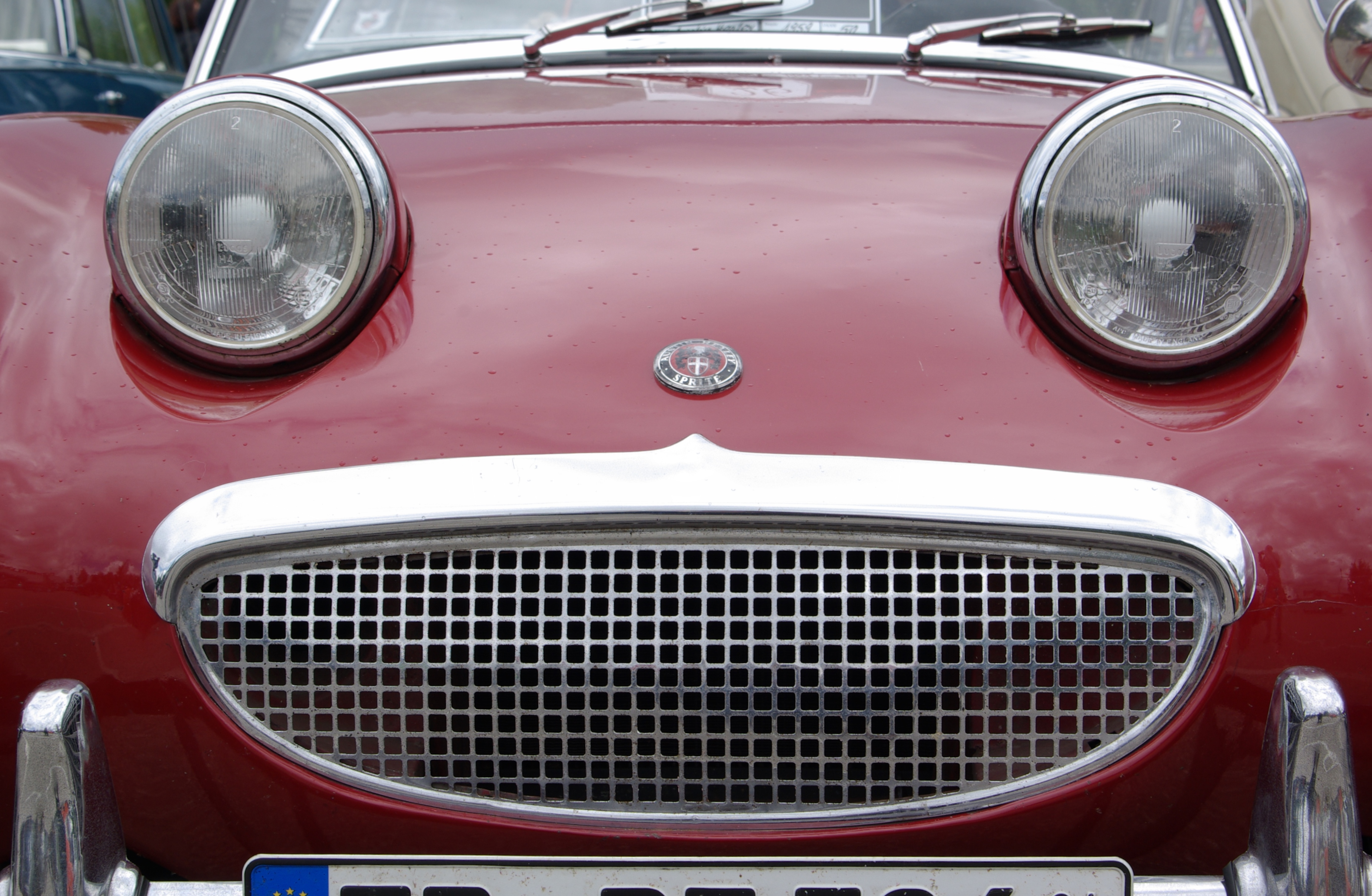 Austin-Healey Sprite AN5, Mark I 'Frogeye', Baujahr 1959, 50 PS 28. Internationales Oldtimer-Treffen, Konz